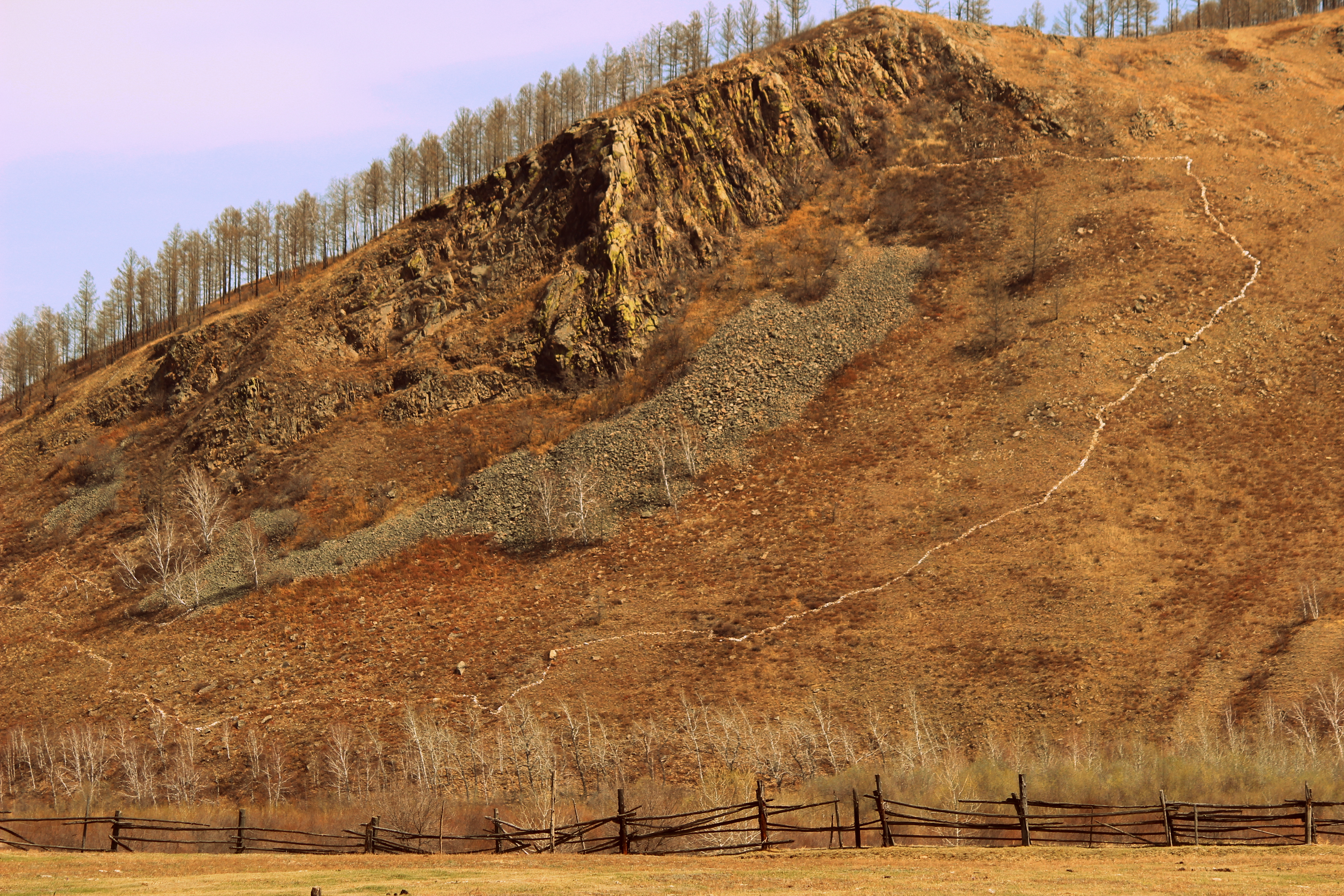 Очертания озера Байкал и границ Бурятии на склоне горы поблизости с селом Шартыкей Джидинского района Бурятии